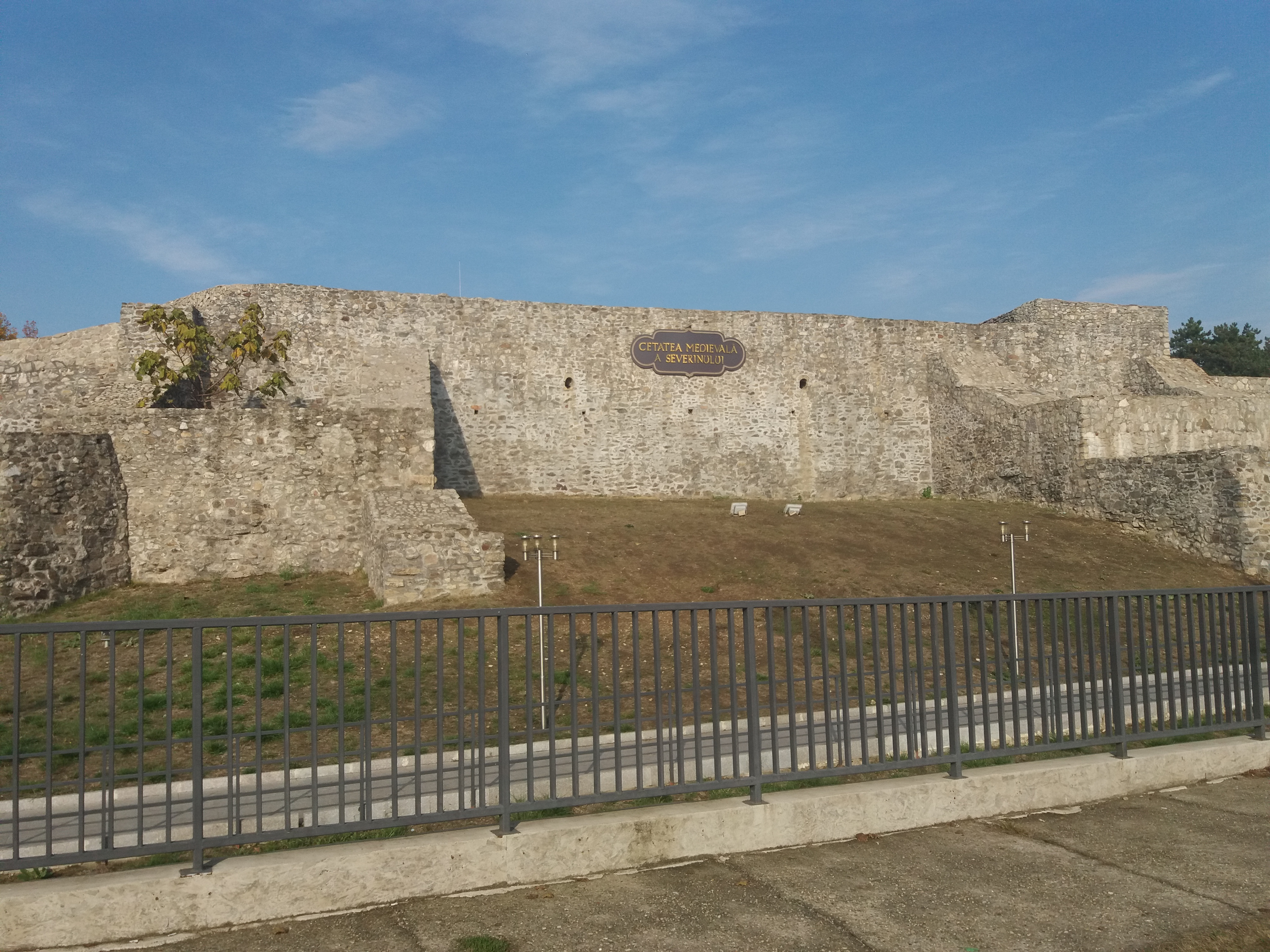 Ruinele Cetății Severinului este un ansamblu de monumente istorice aflat pe teritoriul municipiului Drobeta Turnu Severin.